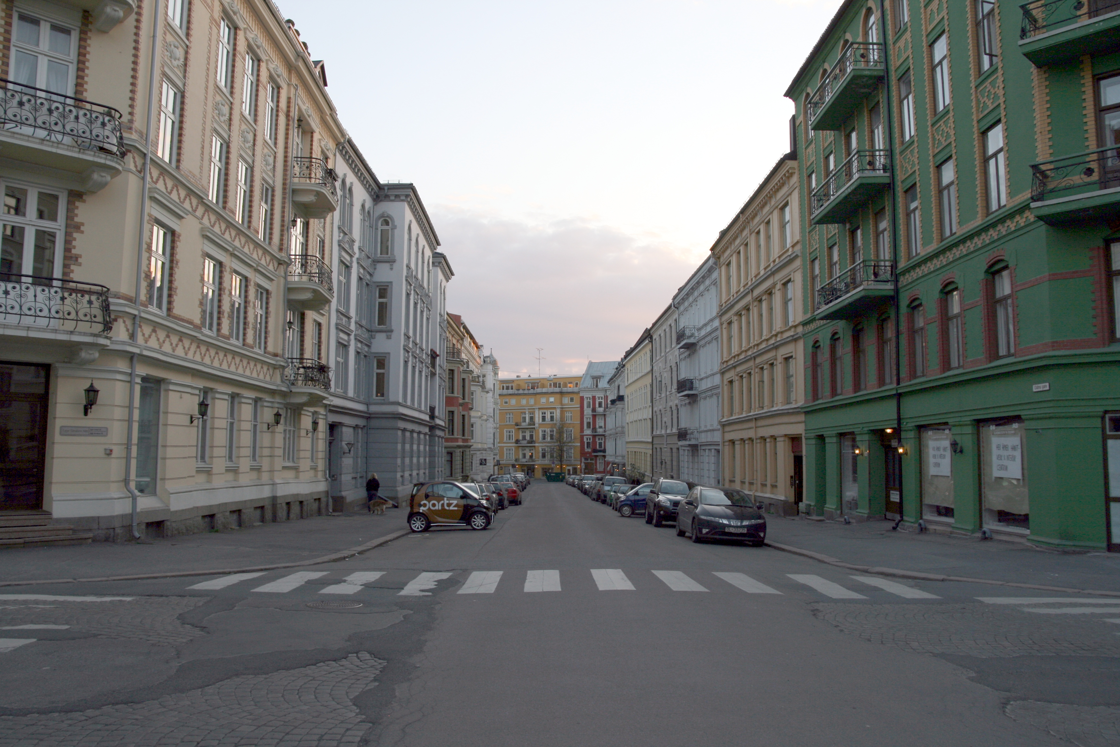 Odins gate på Frogner i Oslo, sett mot vest fra krysset med Gimleveien.